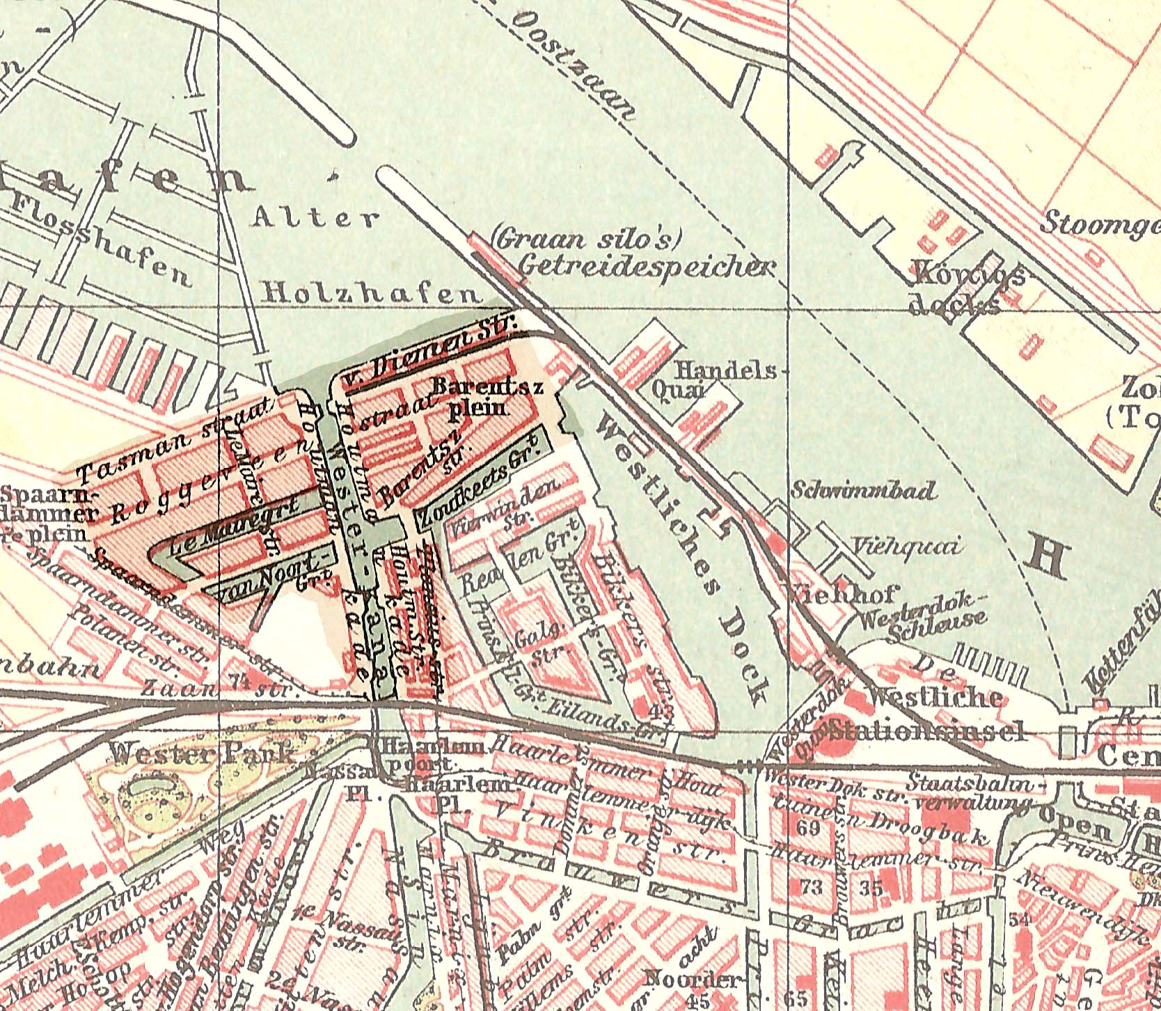 Uitsnede uit Brockhaus Atlas (zie nl::Afbeelding:Amsterdam Westelijke eilanden kaart Brockhaus Konversations Lexikon 1901.jpg uit 1901, door mij bewerkt. Gepubliceerd, dus auteursrecht liep af op 1-1-1972